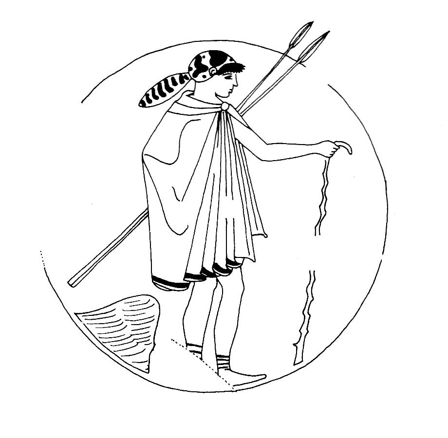 Peripolos (éphèbe athénien) coiffé de l’alopekis et revêtu d'une chlamyde, armé d'un bâton de marche et de deux javelots, montant la garde près d'une pierre qui lui sert de siège. Médaillon d'un kylix attique à figures rouges du Peintre de Briséis, vers 500-450 av. J.-C. Provenance : Orvieto, Italie. Musée des antiquités de l’université de Leipzig, Inv. 510. Beazley ARV² 407.13